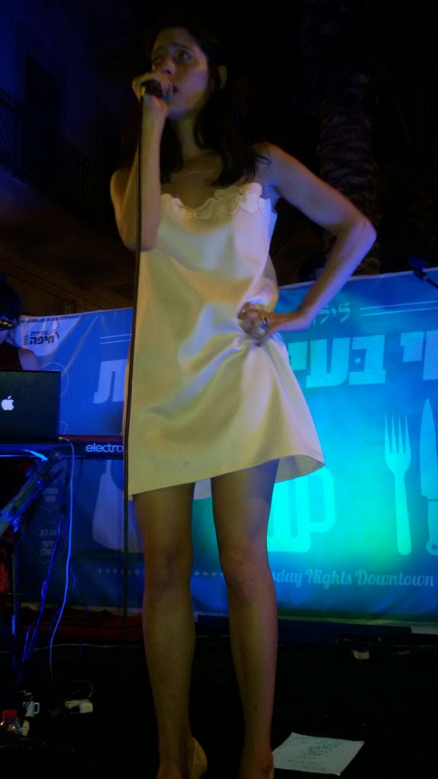 אפרת גוש בהופעה